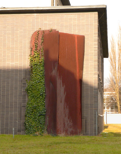 Stahl-Skulptur an der Fassade des Landeskriminalamtes Niedersachsen in Hannover '